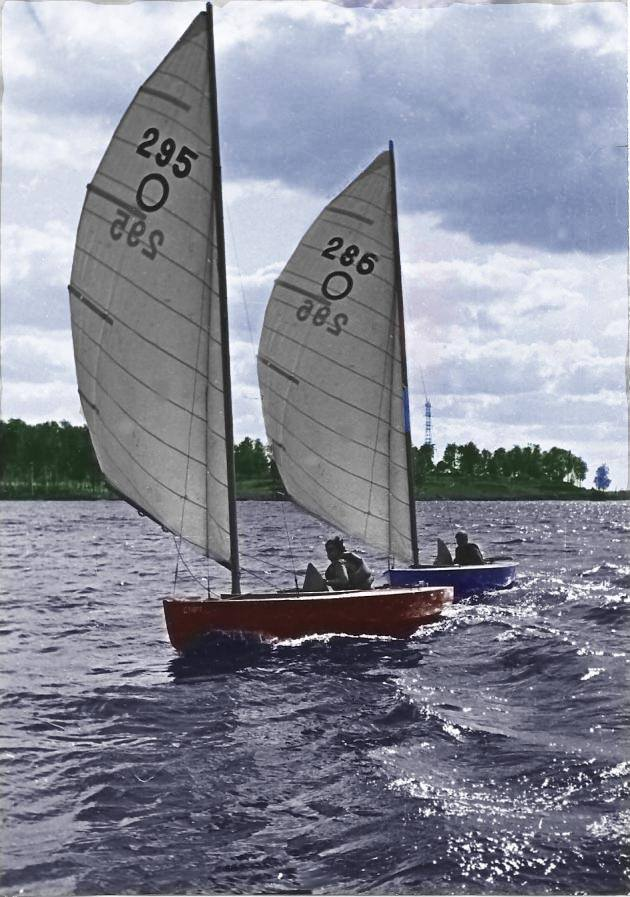 Швертботы бышего олимпийского класса "Олимпик" на Клязьминском водохранилище.